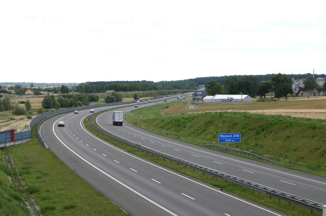 Die Autostrada A4 am Knoten Opole-Dąbrówka (Wyjazd 248) in Richtung Breslau.